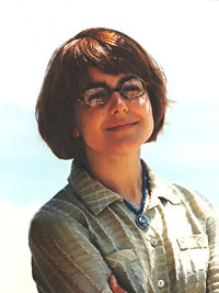 Neslihan Gökdemir foto kamunun kullanımında olan fotograftır